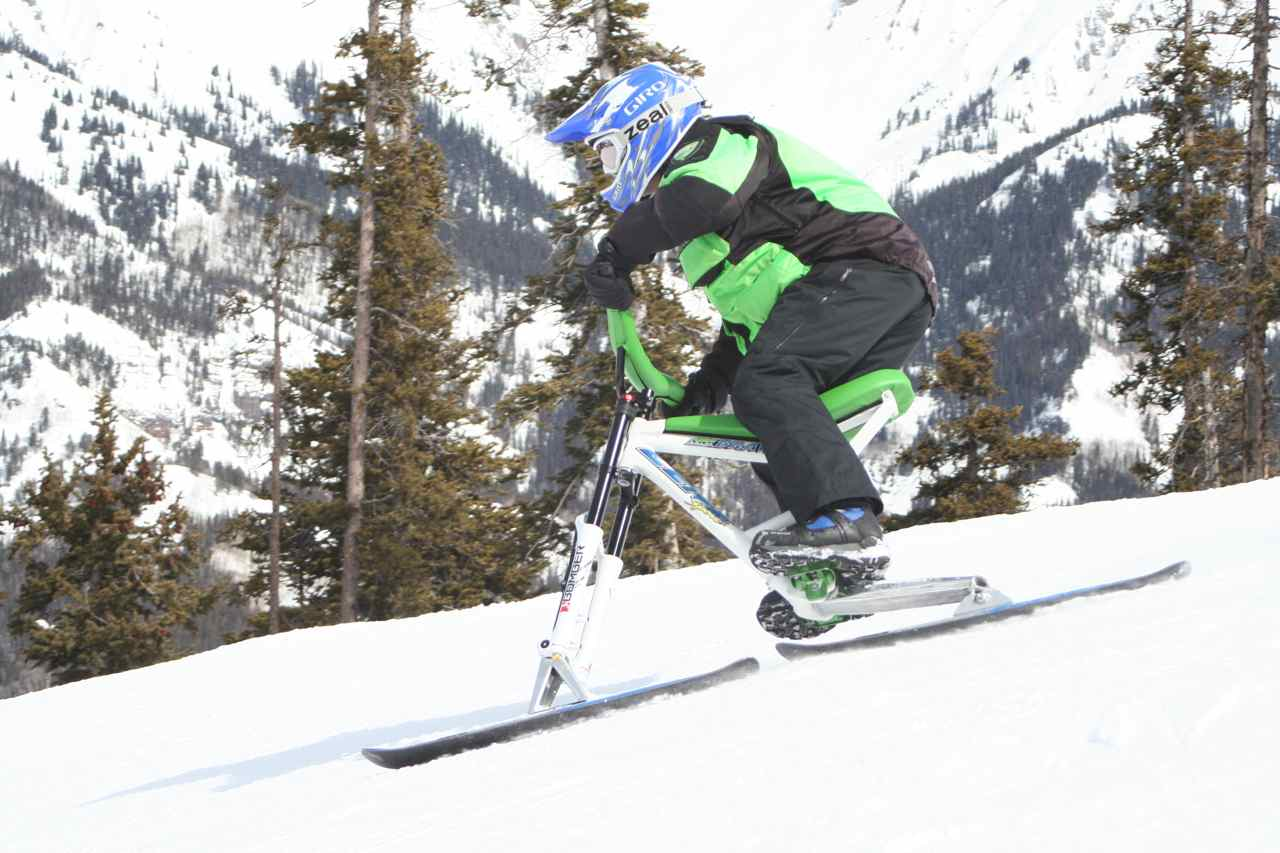 skibiker riding standing on pegs